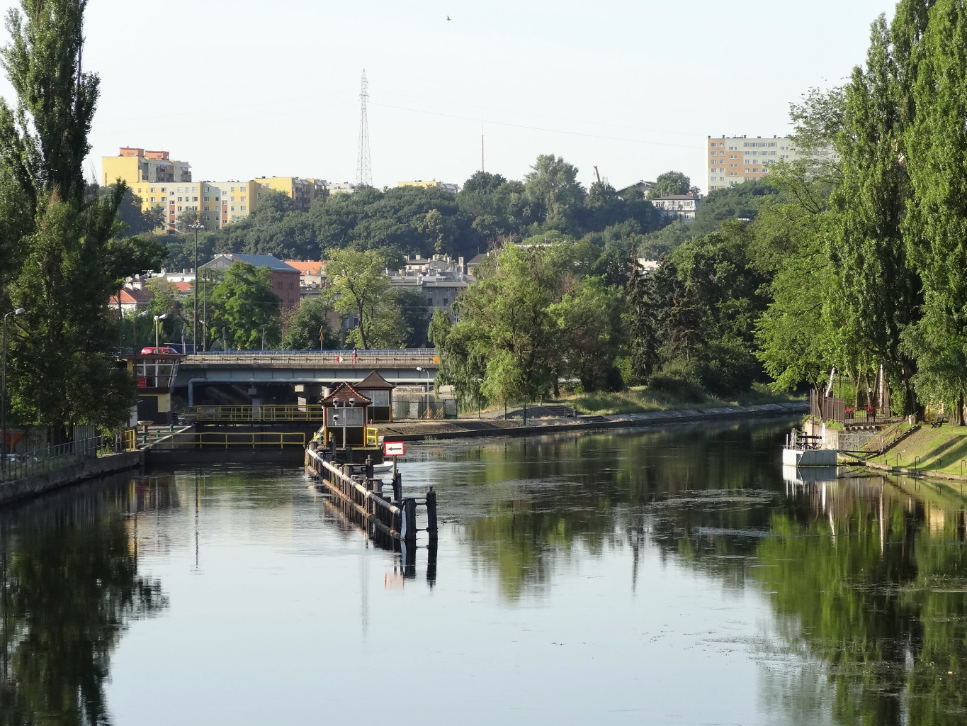 Śluza Miejska w Bydgoszczy na rzece Brdzie. Nurt rozdziela się na Młynówkę (po prawej) i nurt głowny do śluzy (po lewej)